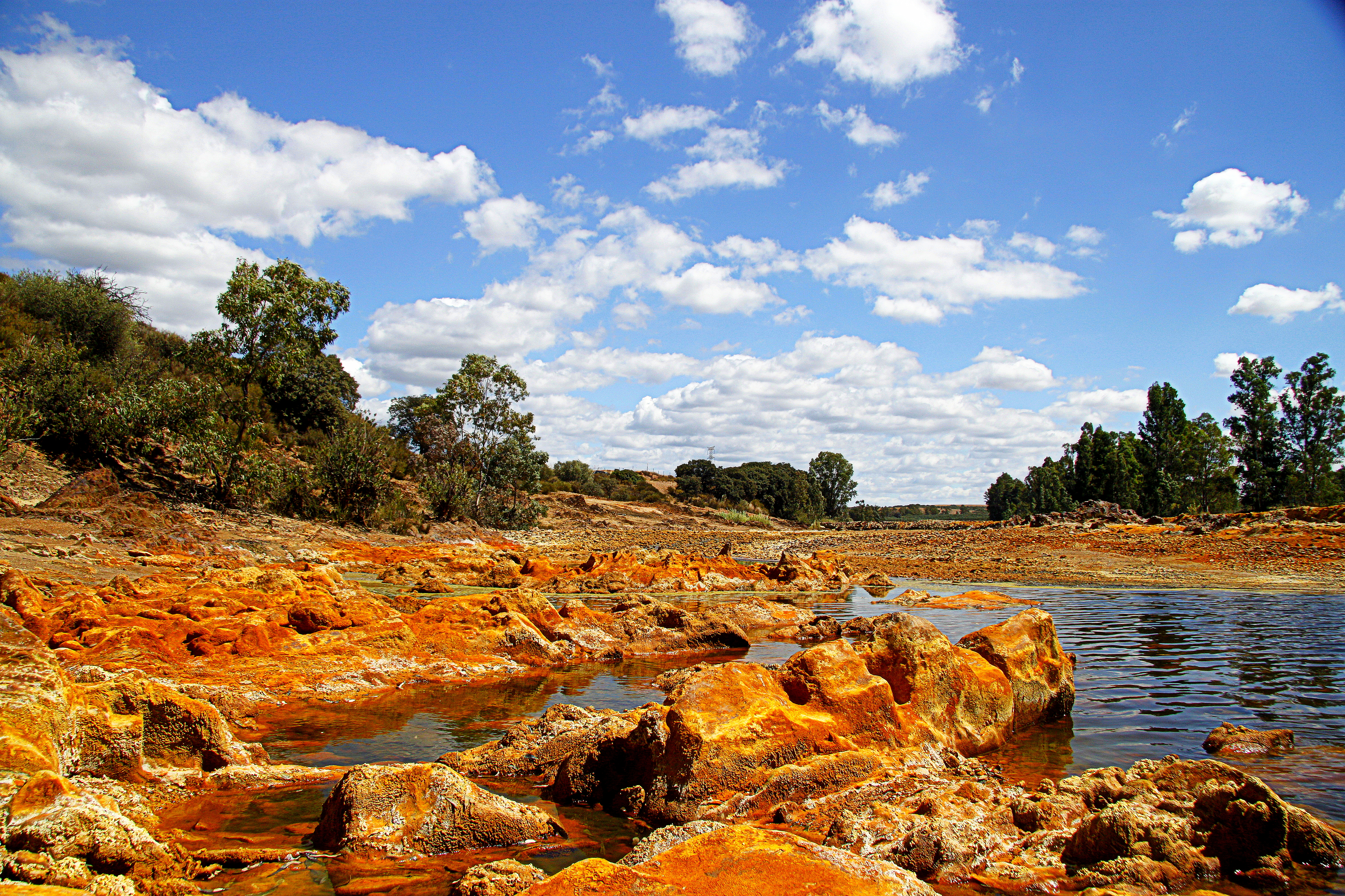 Rio Tinto La Nasa ya buceo por las particulares aguas del rio Tinto en busca de similitudes con el habitat del planeta Marte.Ahora, a pesar de la cantidad de metales pesados que contines sus aguas,es posible visualizar la vida, y no solo en forma de microorganismo tambien en estas coloridas algas.